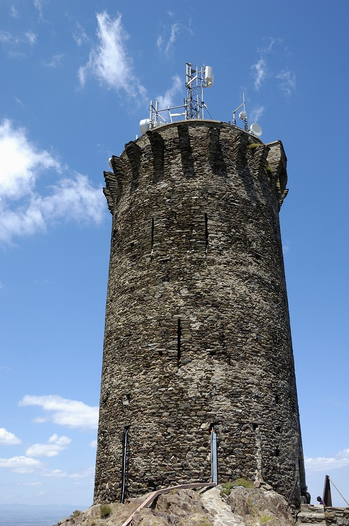 Tour Madeloc, Port-Vendres